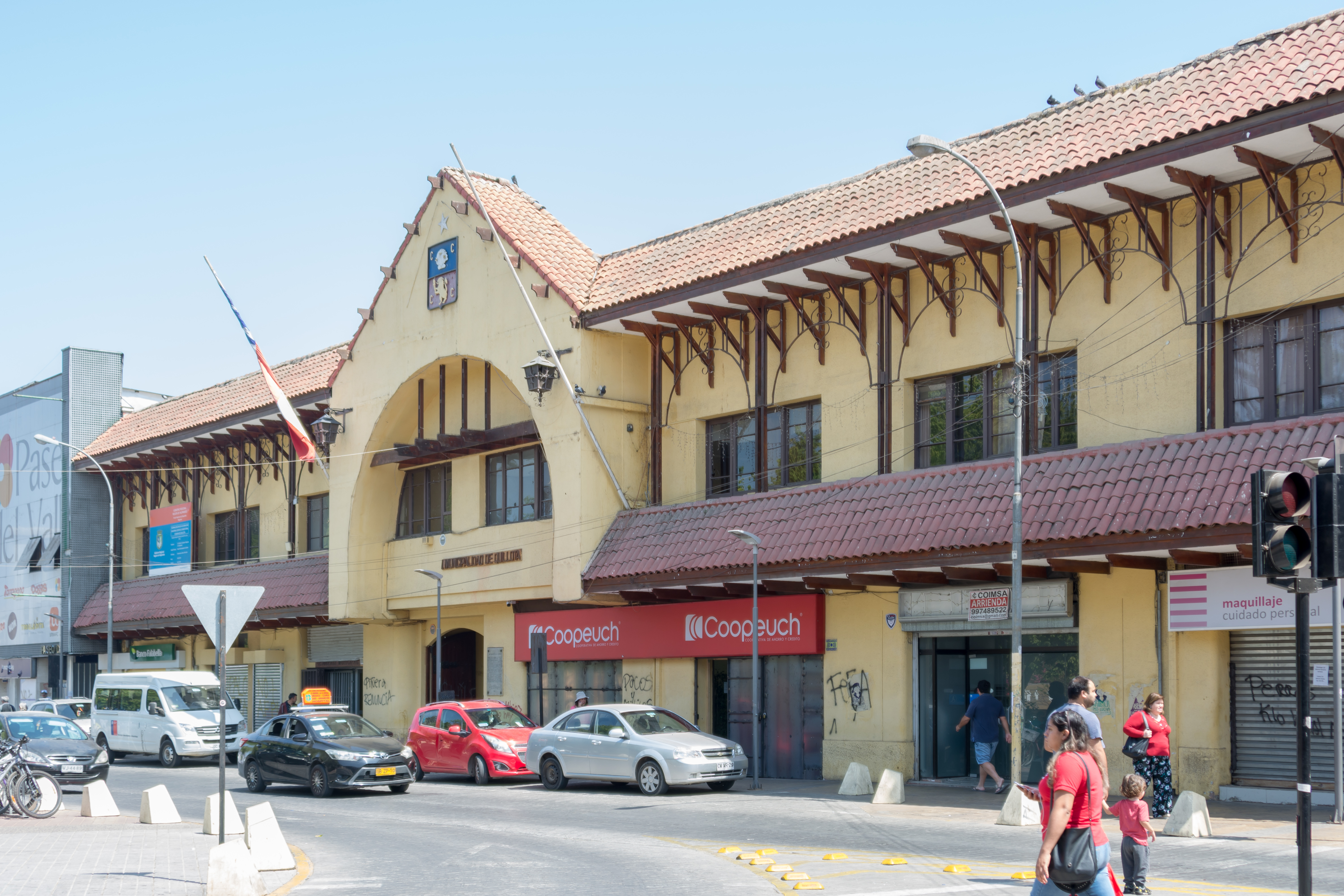 Edificio Consistorial de Quillota, Quillota, Región de Valparaíso, Chile